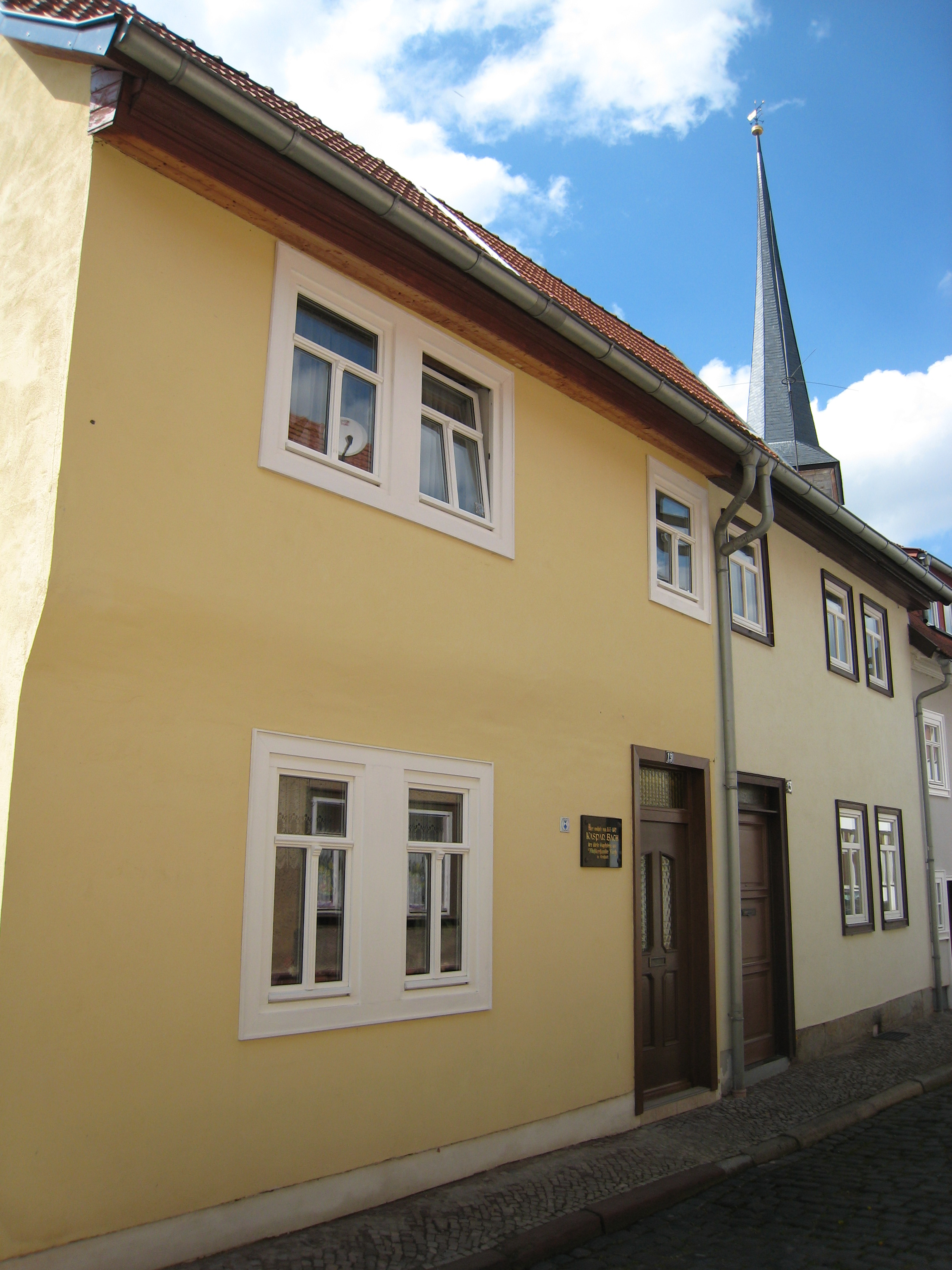 Das Wohnhaus von Caspar Bach in der Jacobsgasse 13/15 in Arnstadt.